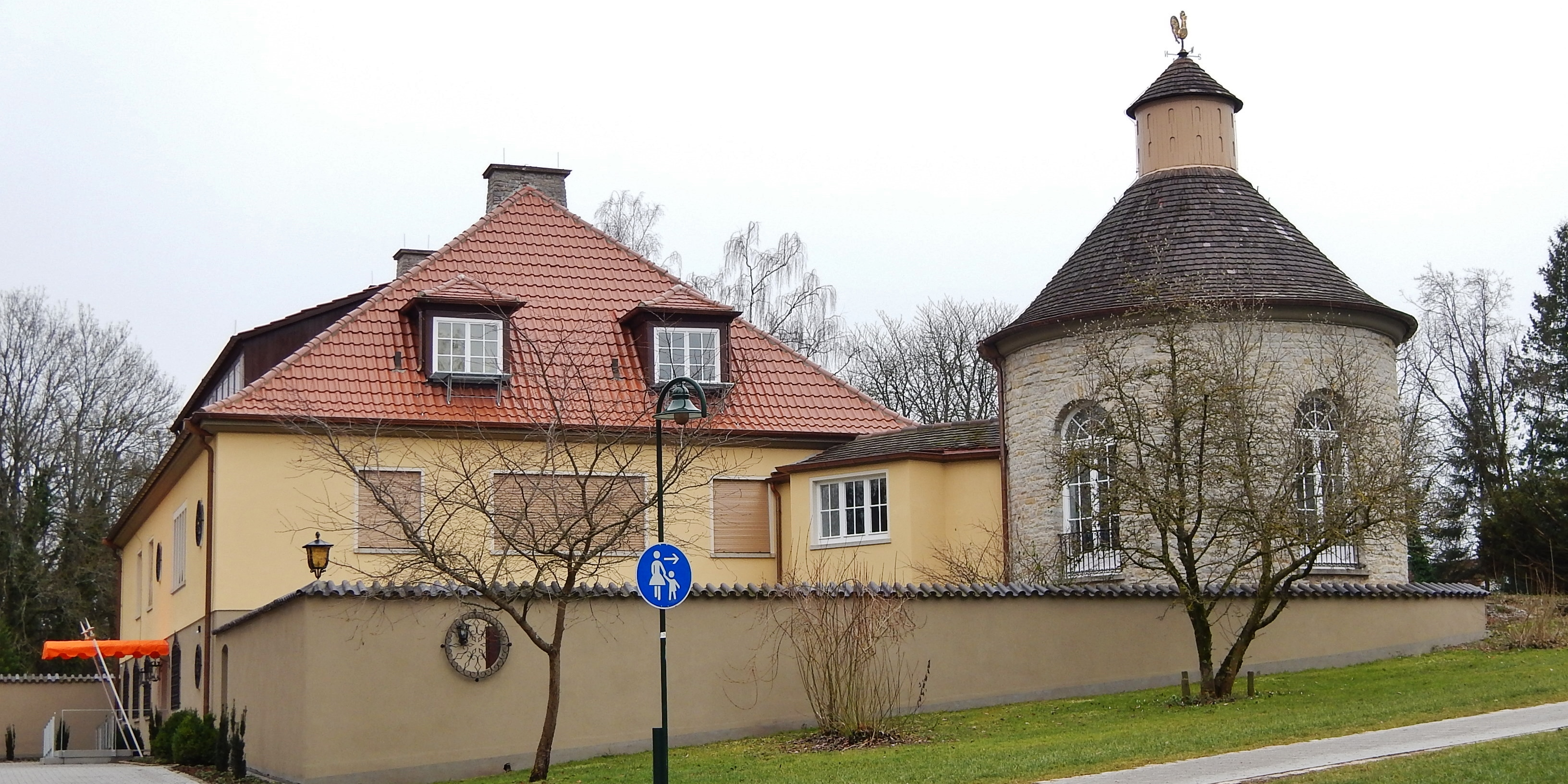 Villa Schwalbenhof: Erich Kiefer (1945-1982: Fabrik für lufttechnische Anlagen) baut 1954 die Villa Schwalbenhof inklusive Park